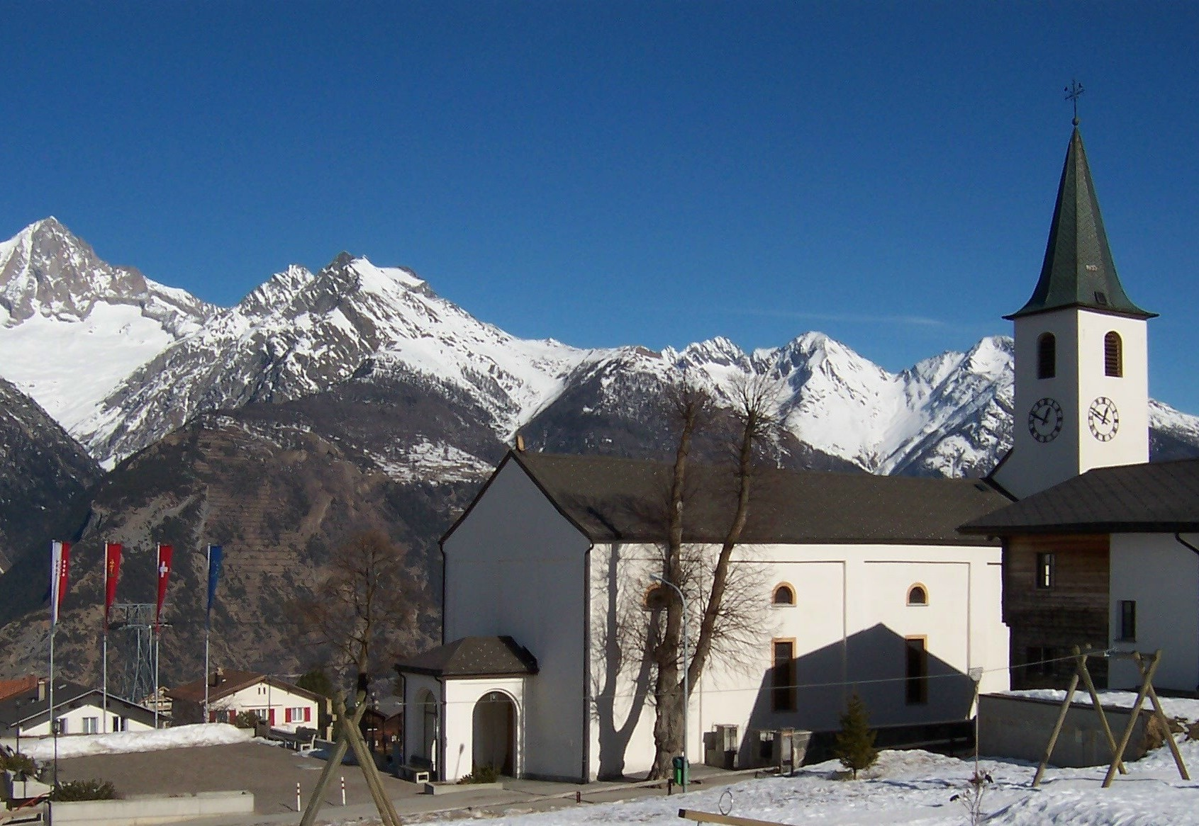 Unterbächer Pfarrkirche Heilige Dreifaltigkeit aus dem Don Bosco-Park gesehen. Ganz links über dem Rhonetal das Bietschhorn.